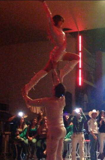 La quebradita ha evolucionado del paso de caballito a un baile típico abrazado mas veloz combinado con acrobacias de distintos géneros como el rock acrobático, swing y lindy hop.